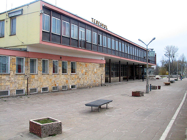 Dworzec kolejowy w Terespolu.